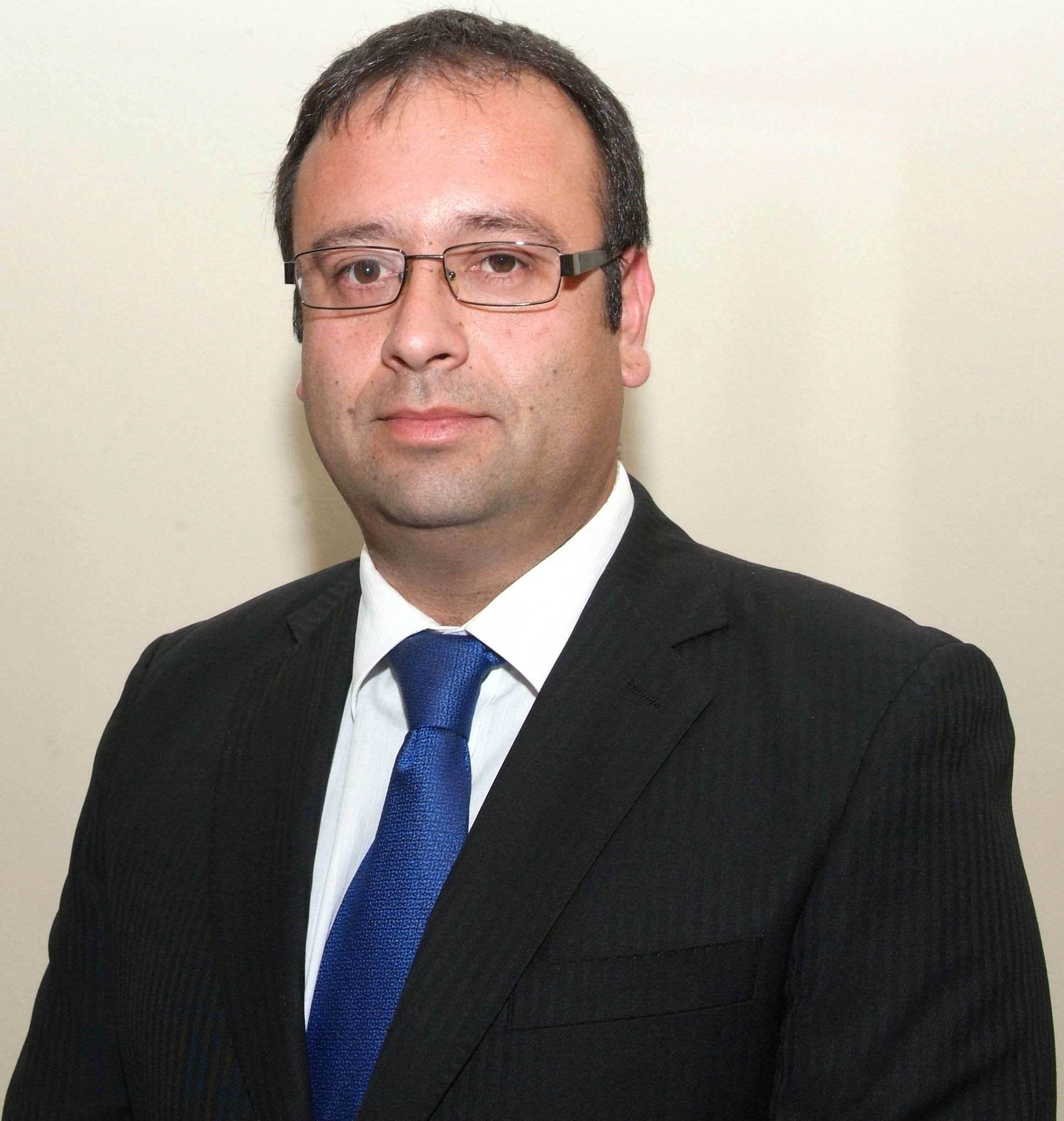 Wladimir Román, Intendente de la Región del Libertador Bernardo O'Higgins